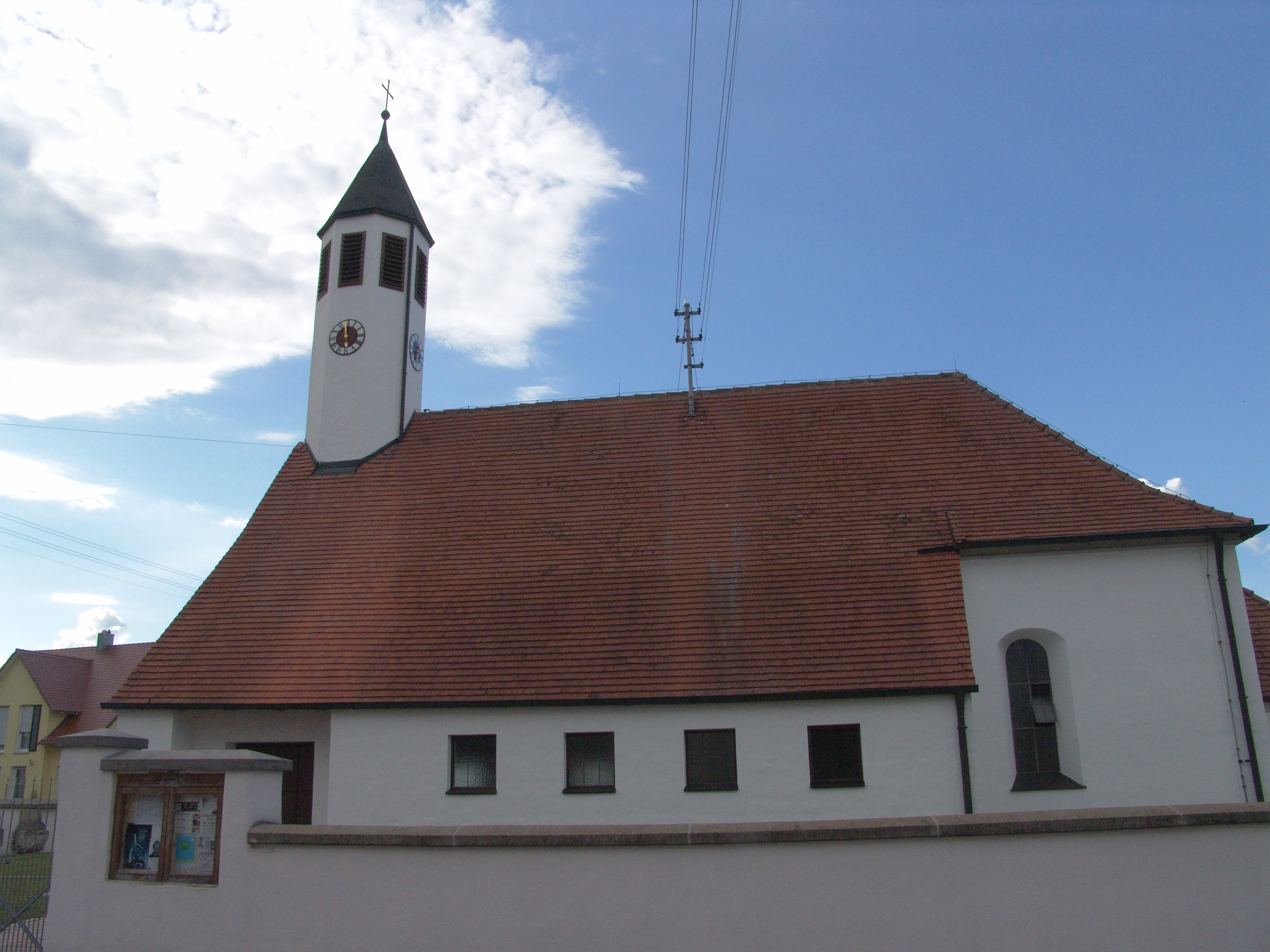 evang.-luth. Kirche St. Leonhard in Schwörsheim